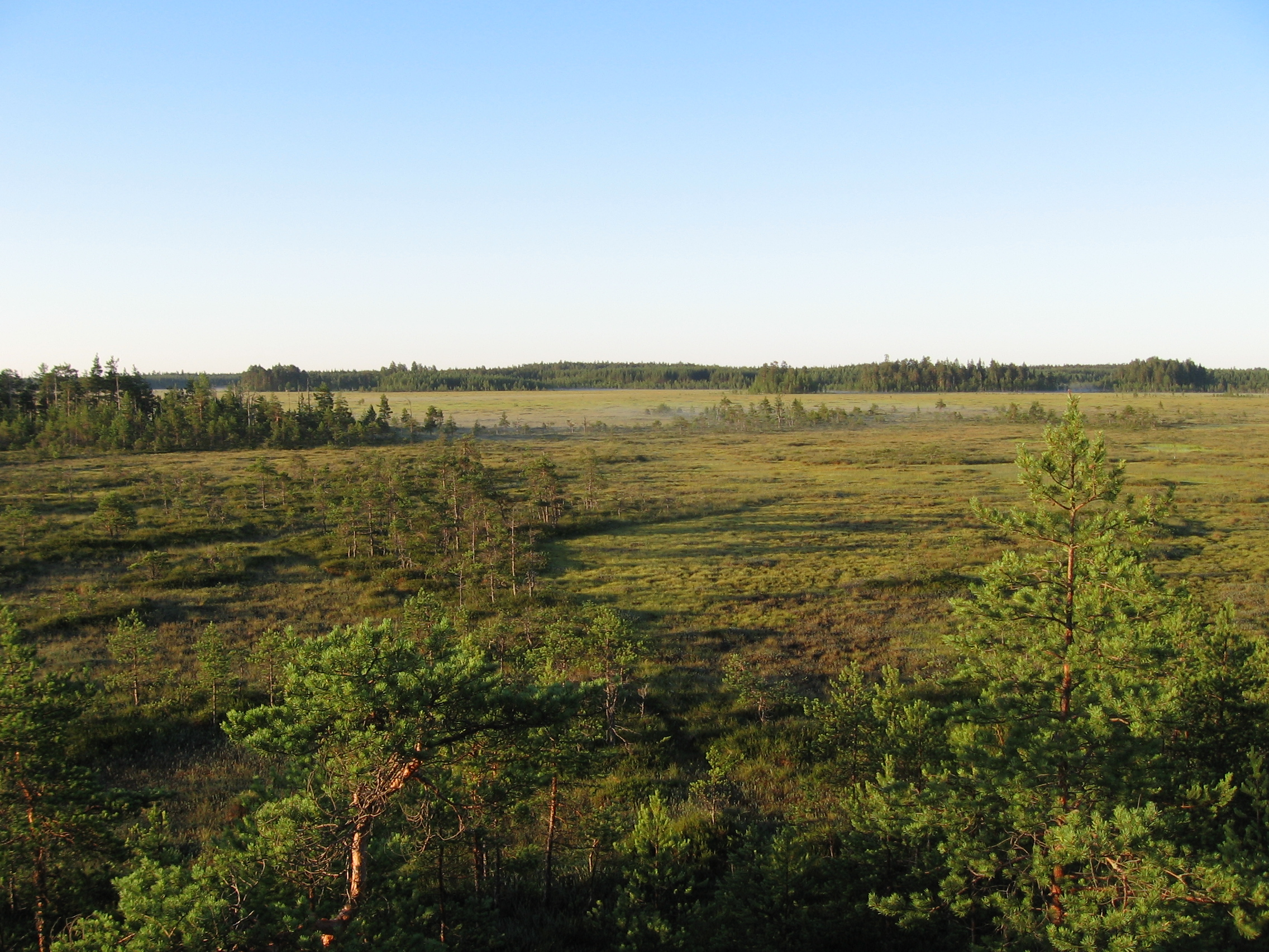 Näkymä Valkmusan kansallispuiston lintutornista Pyhtäällä.